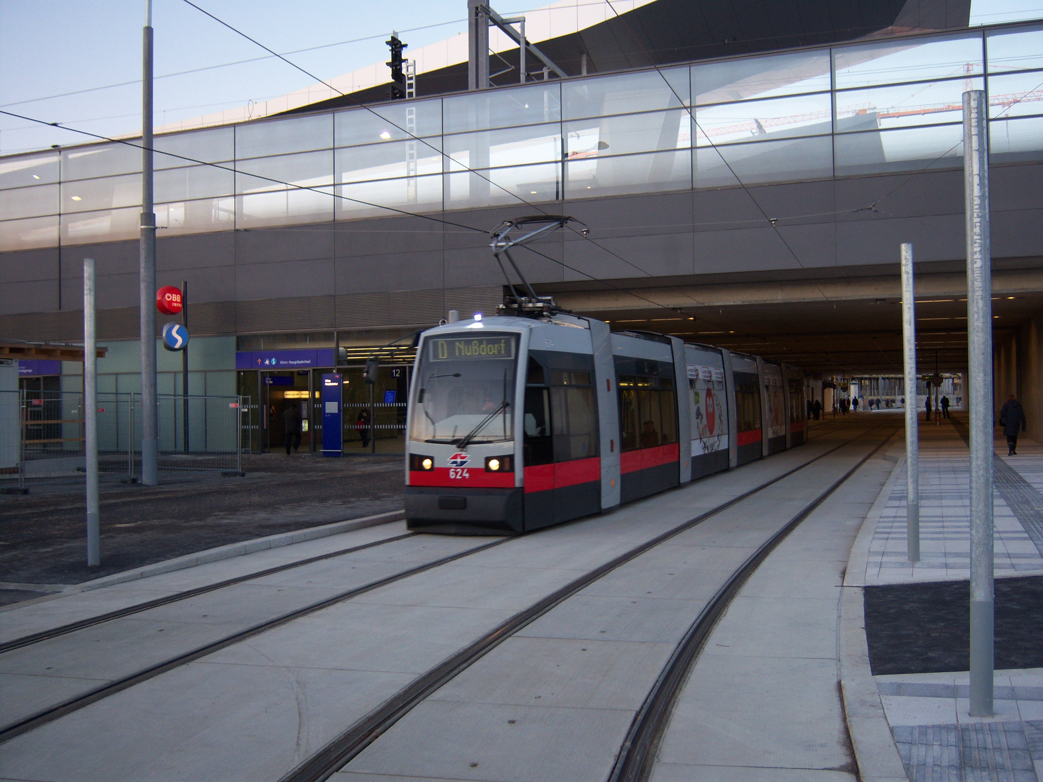 Ein Zug der Linie D verlässt die Haltestelle Hauptbahnhof Ost in der Unterführung Karl-Popper-Straße in Richtung Wendeschleife in der Endstelle Alfred-Adler-Straße